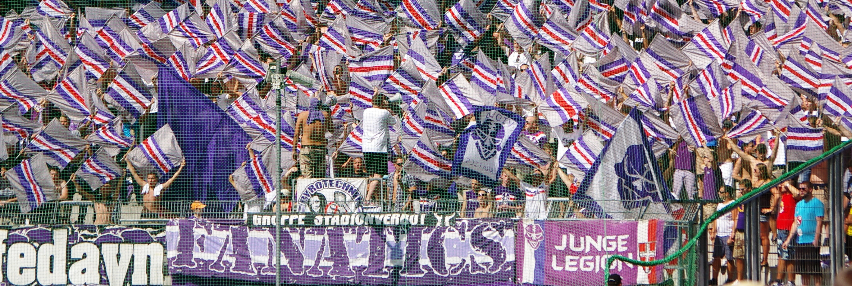 Fans away Austria Wien